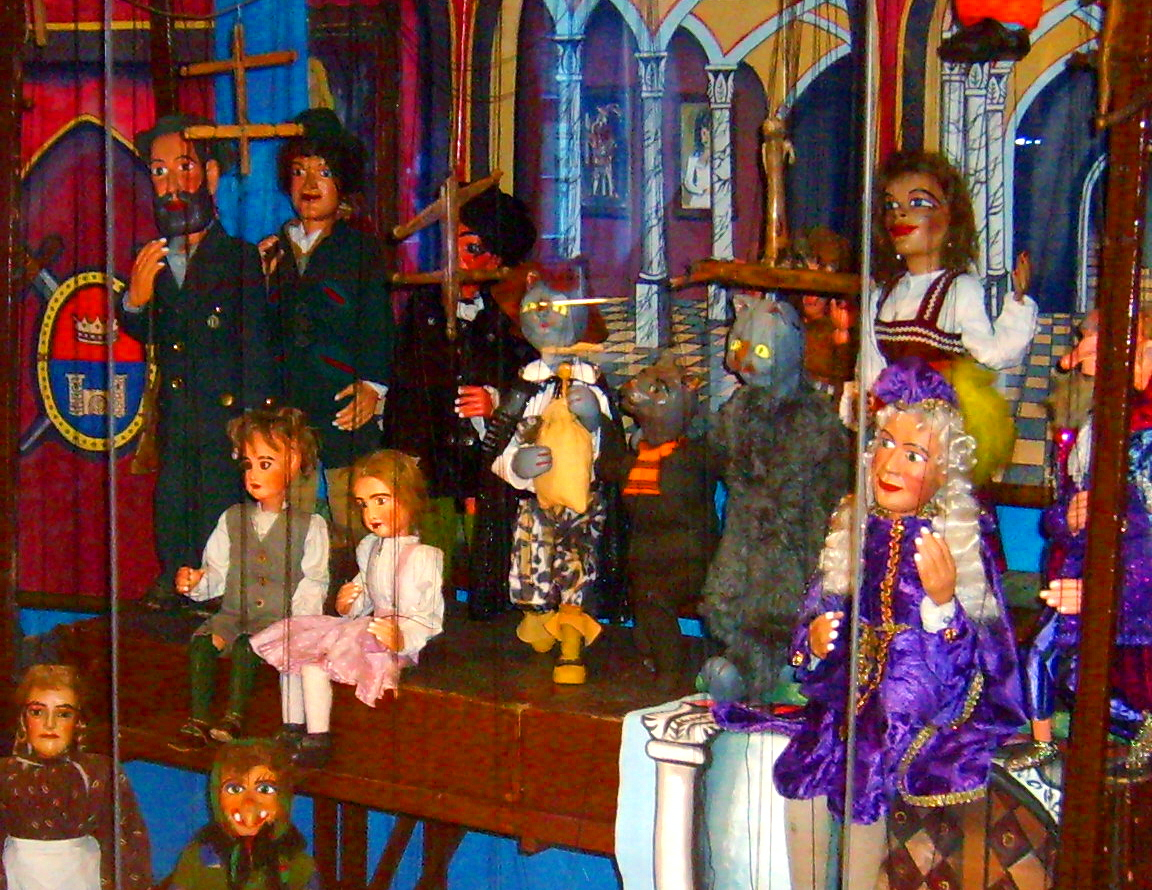 Marionettenpuppen.